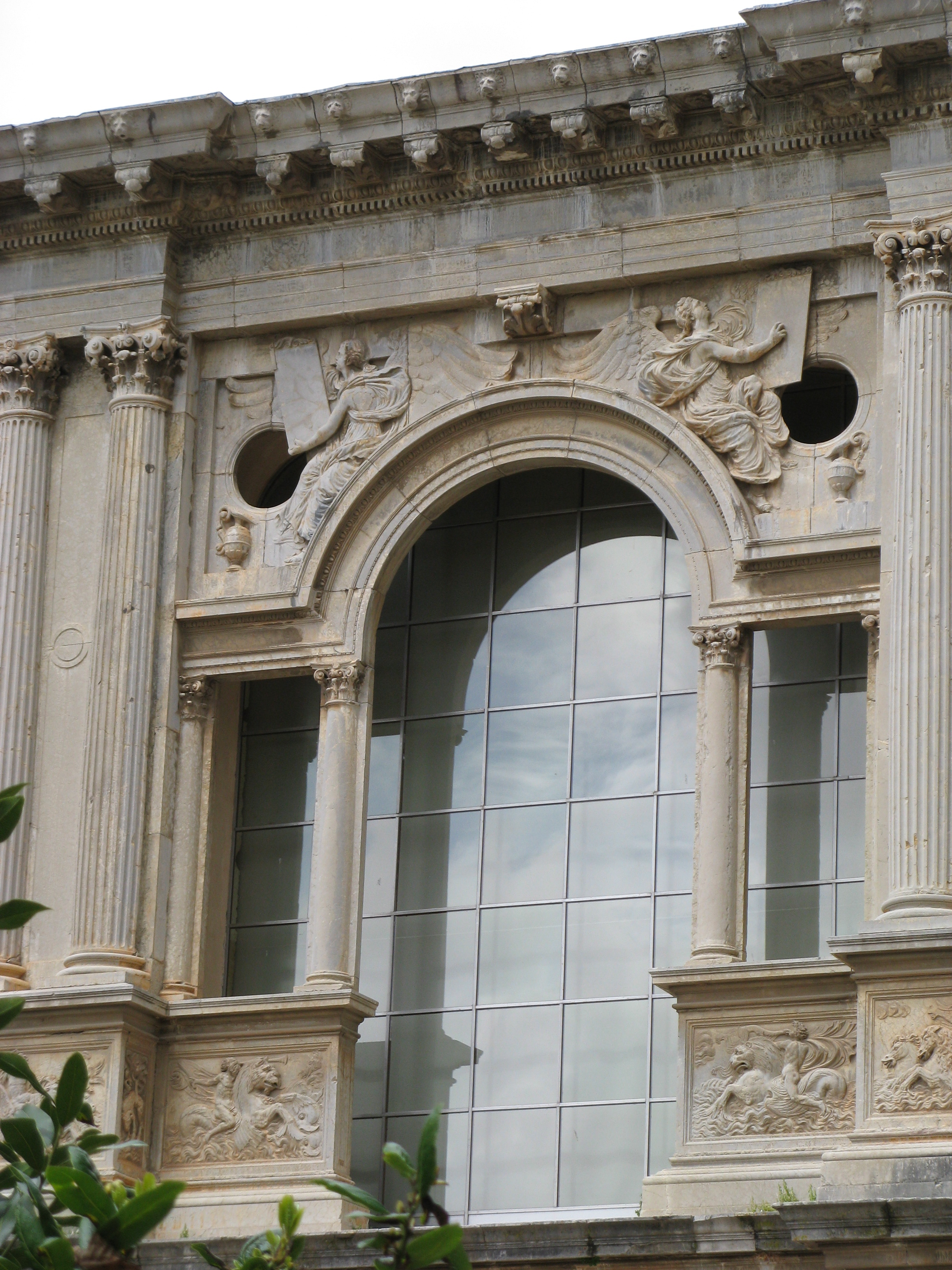 Palacio de Carlos V.